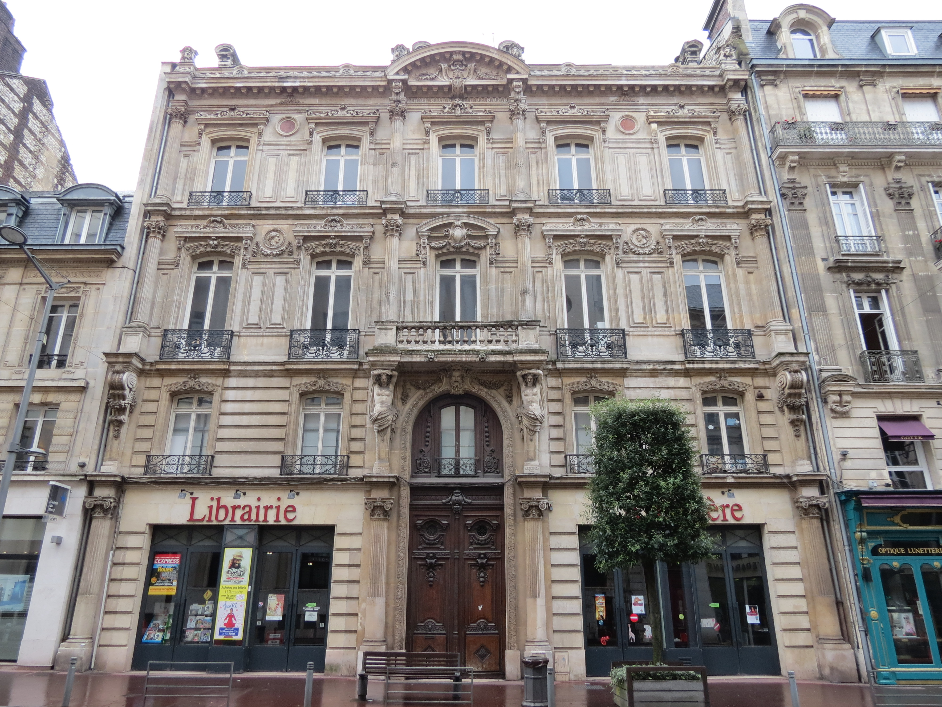 L'Armitière, librairie indépendante rouennaise, au 66 de la rue Jeanne-d'Arc.